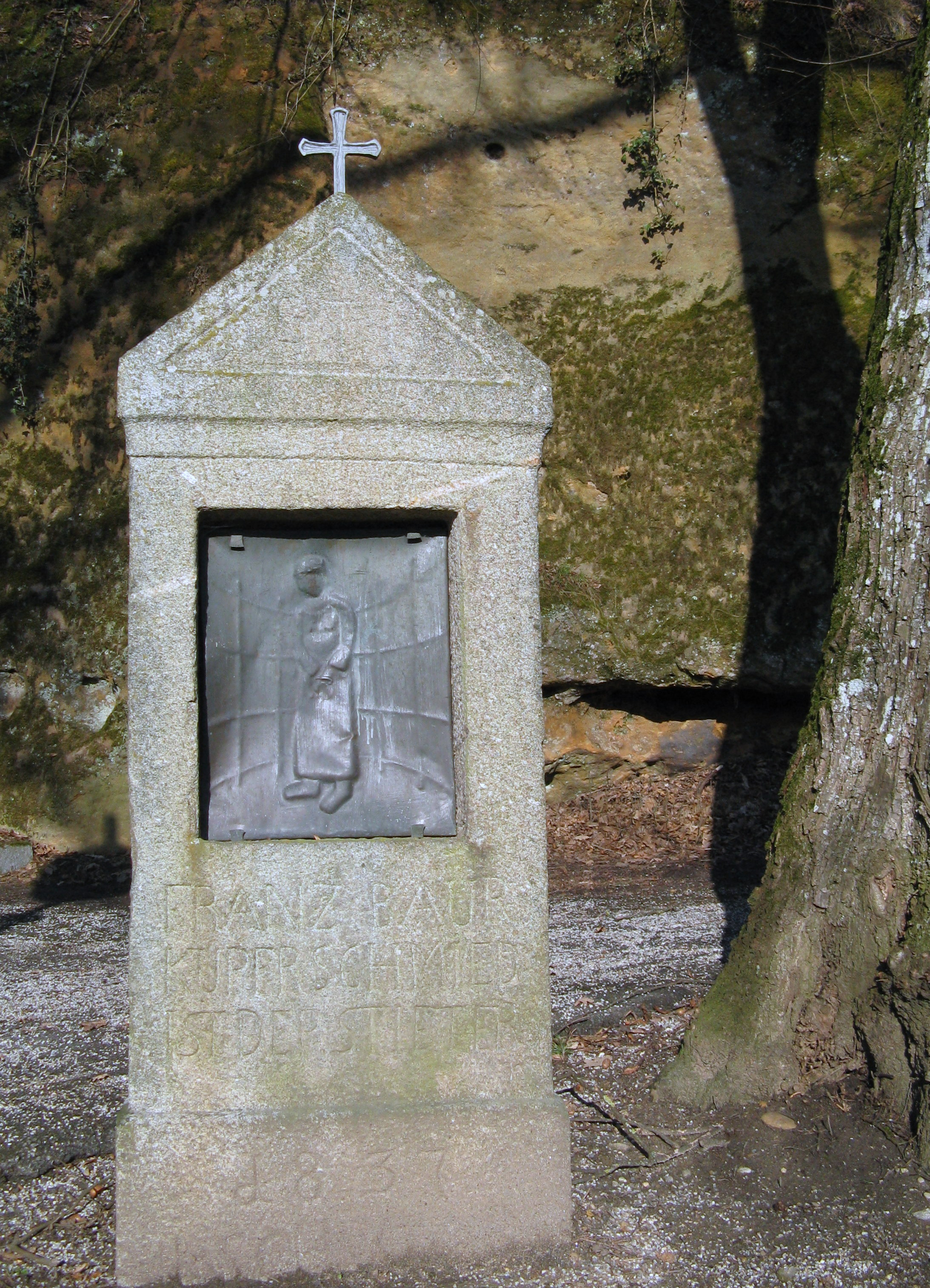 Eine von 12 Kreuzwegstationen entlang des Weges vom Perger Stadtzentrum zur Perger Kalvarienbergkirche und zu den Perger Friedhöfen